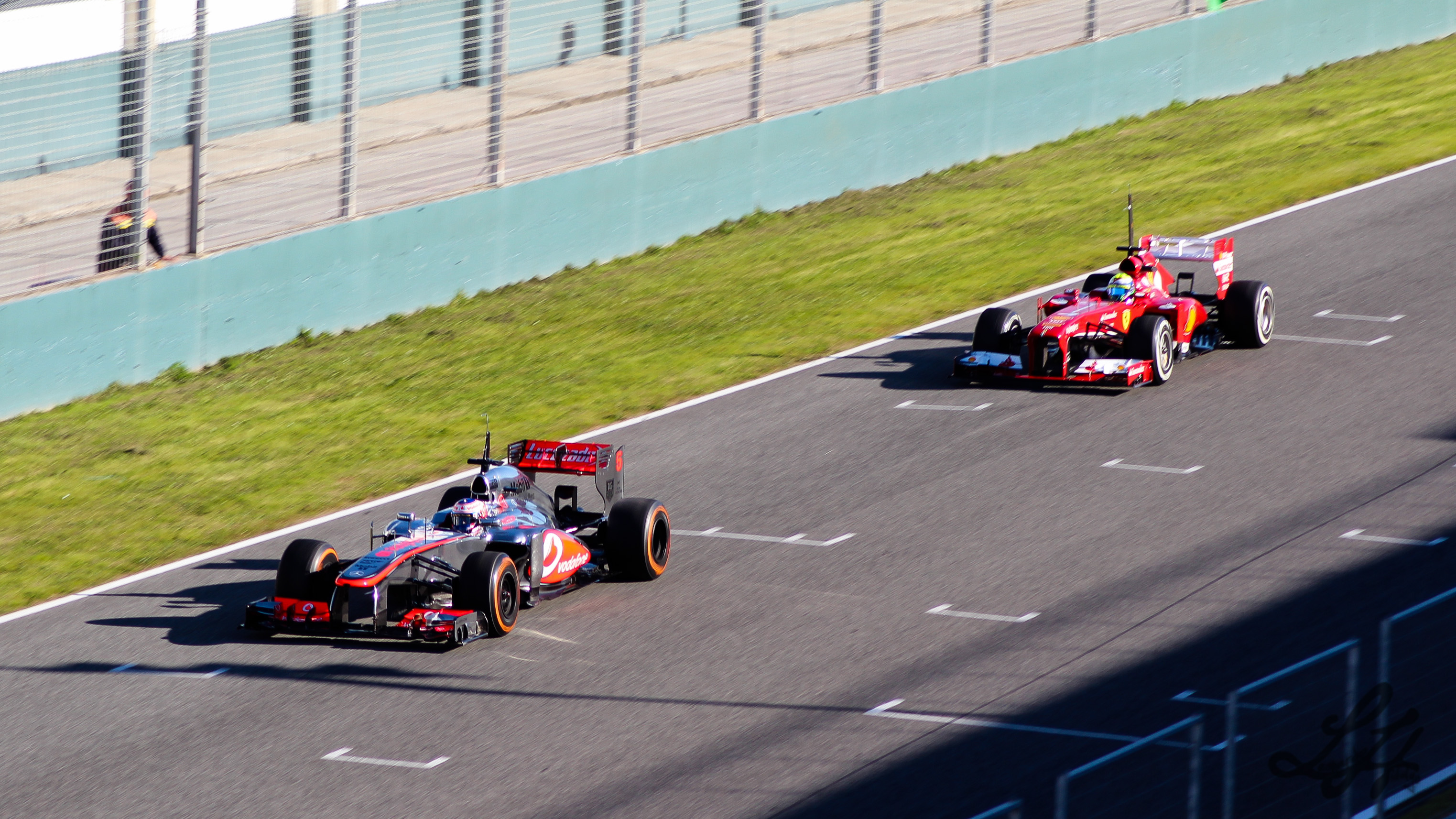 Fotos hechas el 7 de Febrero de 2013 en el circuito de Jerez, plena pre-temporada de F1. Would you like to follow me on Instagram and Twitter?